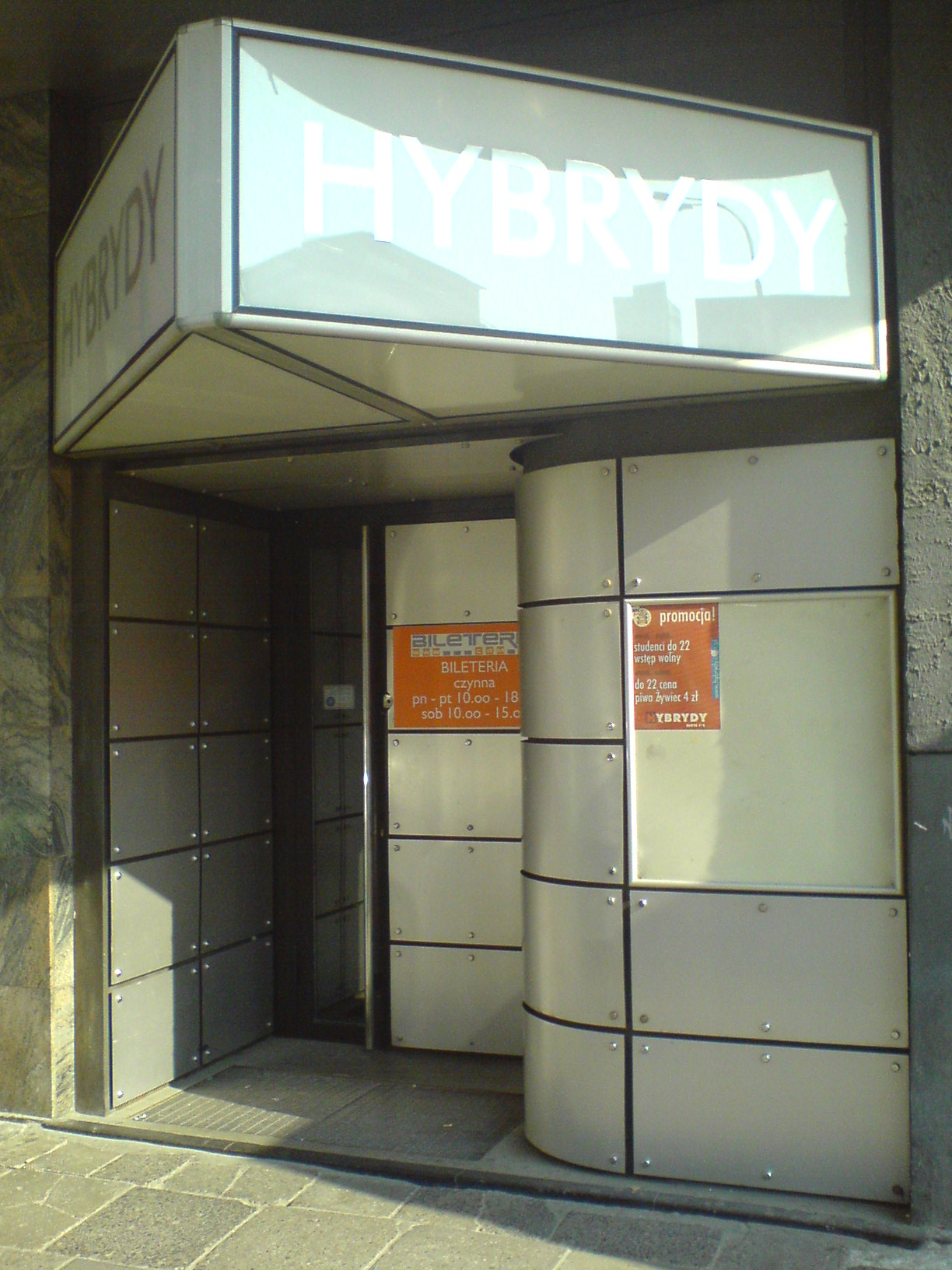 PL, Warszawa, klub "Hybrydy", ul. Złota 7/9 (drzwi wejściowe)